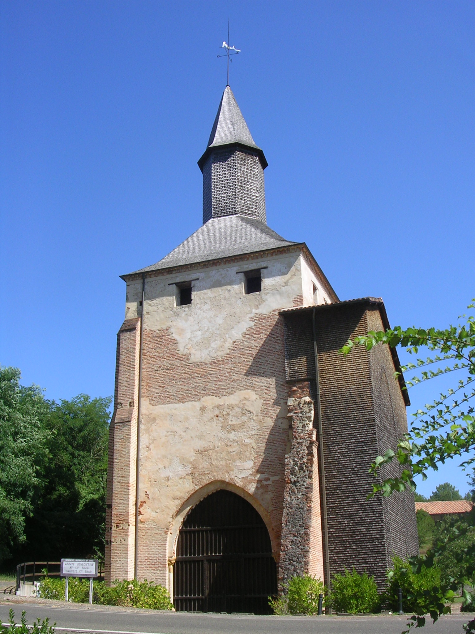 Clocher porche de l'ancienne église Sainte-Marie de Mimizan, dans le département français des Landes